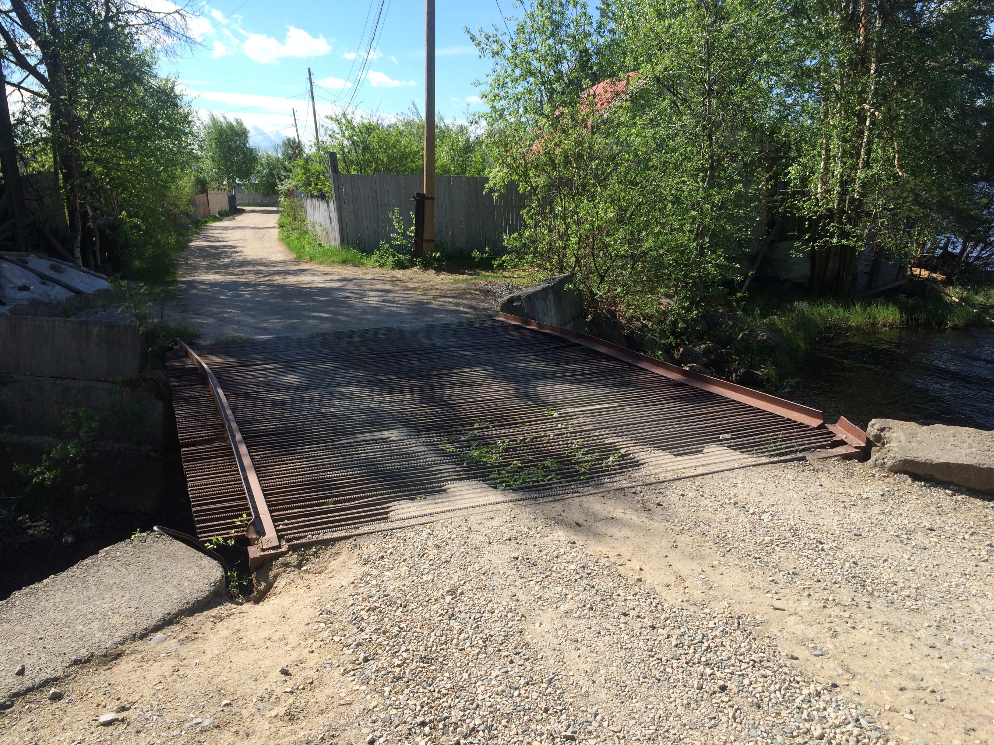 Пирттиярви